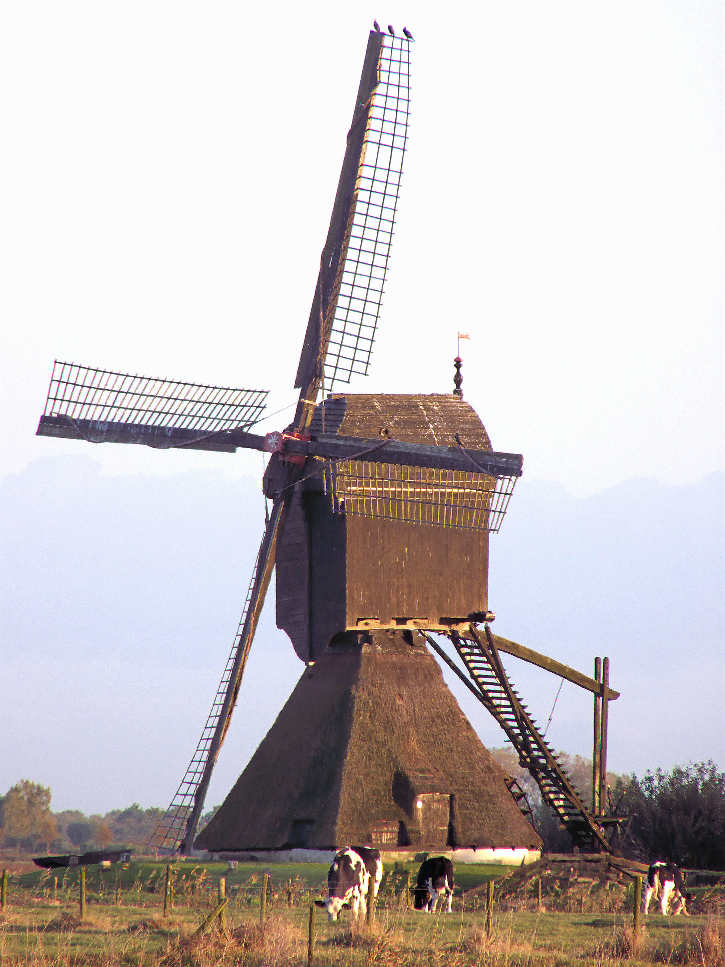 Uitwijkse molen, Uppel, Noord-Brabant